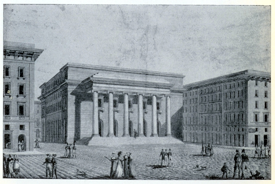 Le Grand Théâtre de Marseille en 1813 Dessiné par Lécuyer